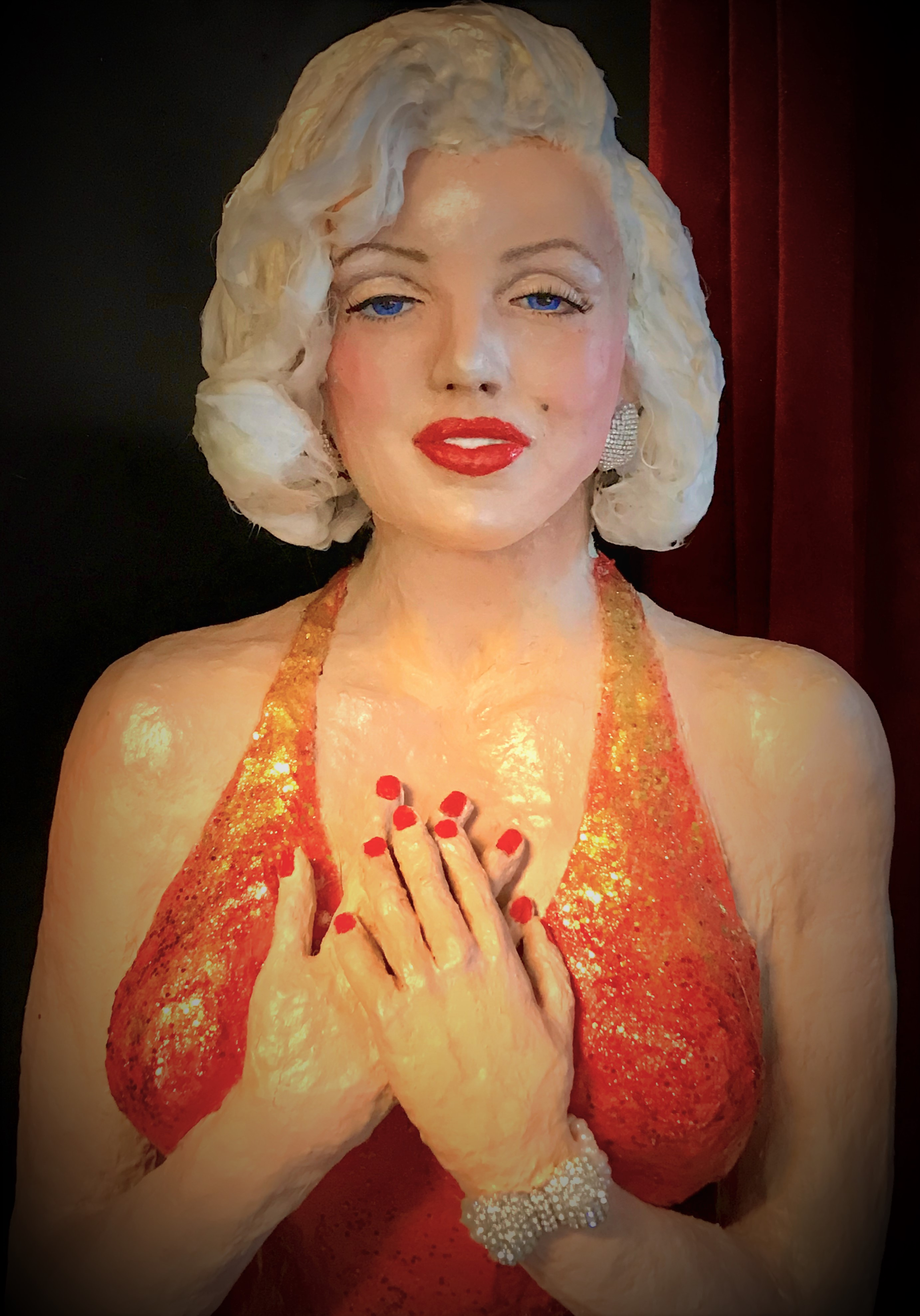 Pappmaché Figur von Marilyn Monroe